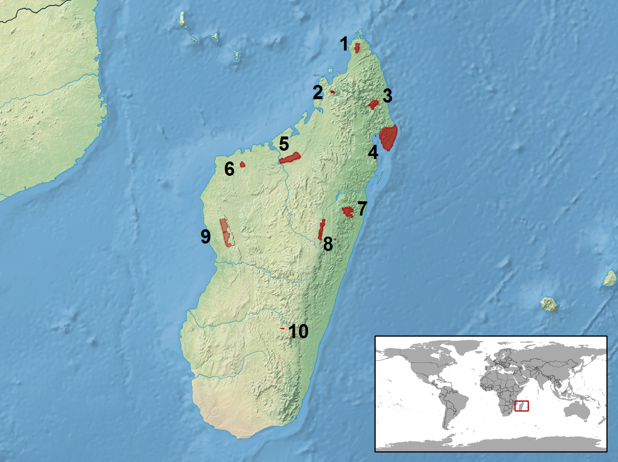 Distribution of ten Brookesia- species. 1 = Brookesia ambreensis 2 = Brookesia bekolosy 3 = Brookesia karchei 4 = Brookesia peyrierasi 5 = Brookesia decaryi 6 = Brookesia bonsi 7 = Brookesia lambertoni 8 = Brookesia ramanantsoai 9 = Brookesia exarmata 10 = Brookesia brunoi